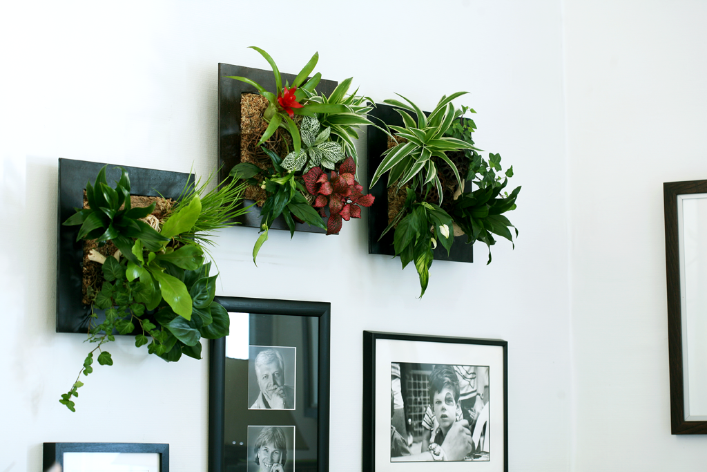 Le cadre végétal